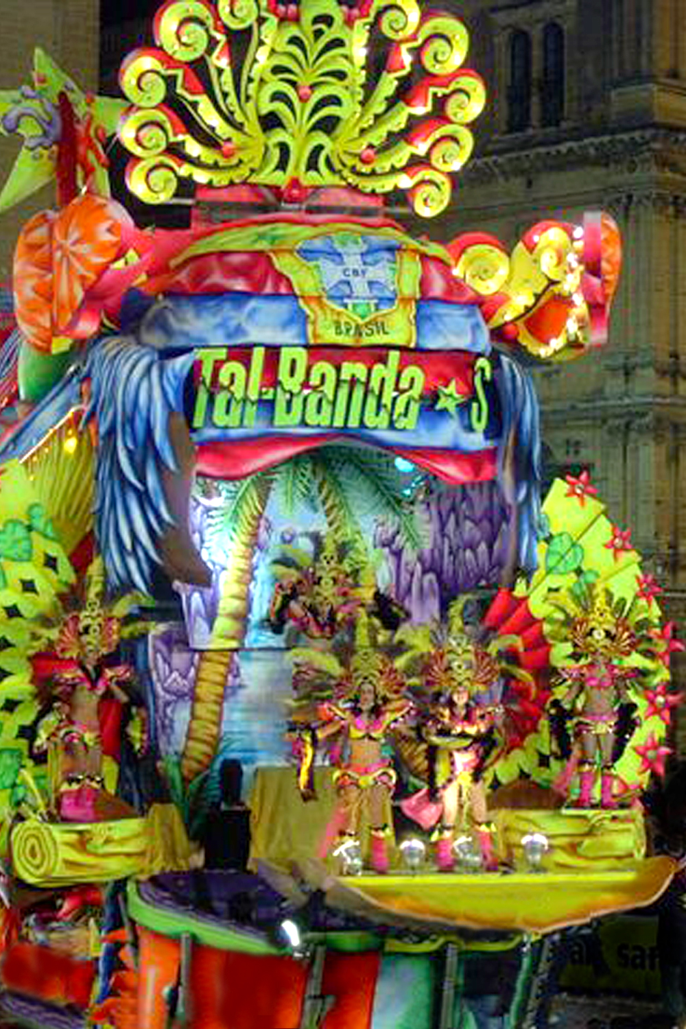 char de carnaval Tal-Bande en 2006 dans l'arena à La Valette